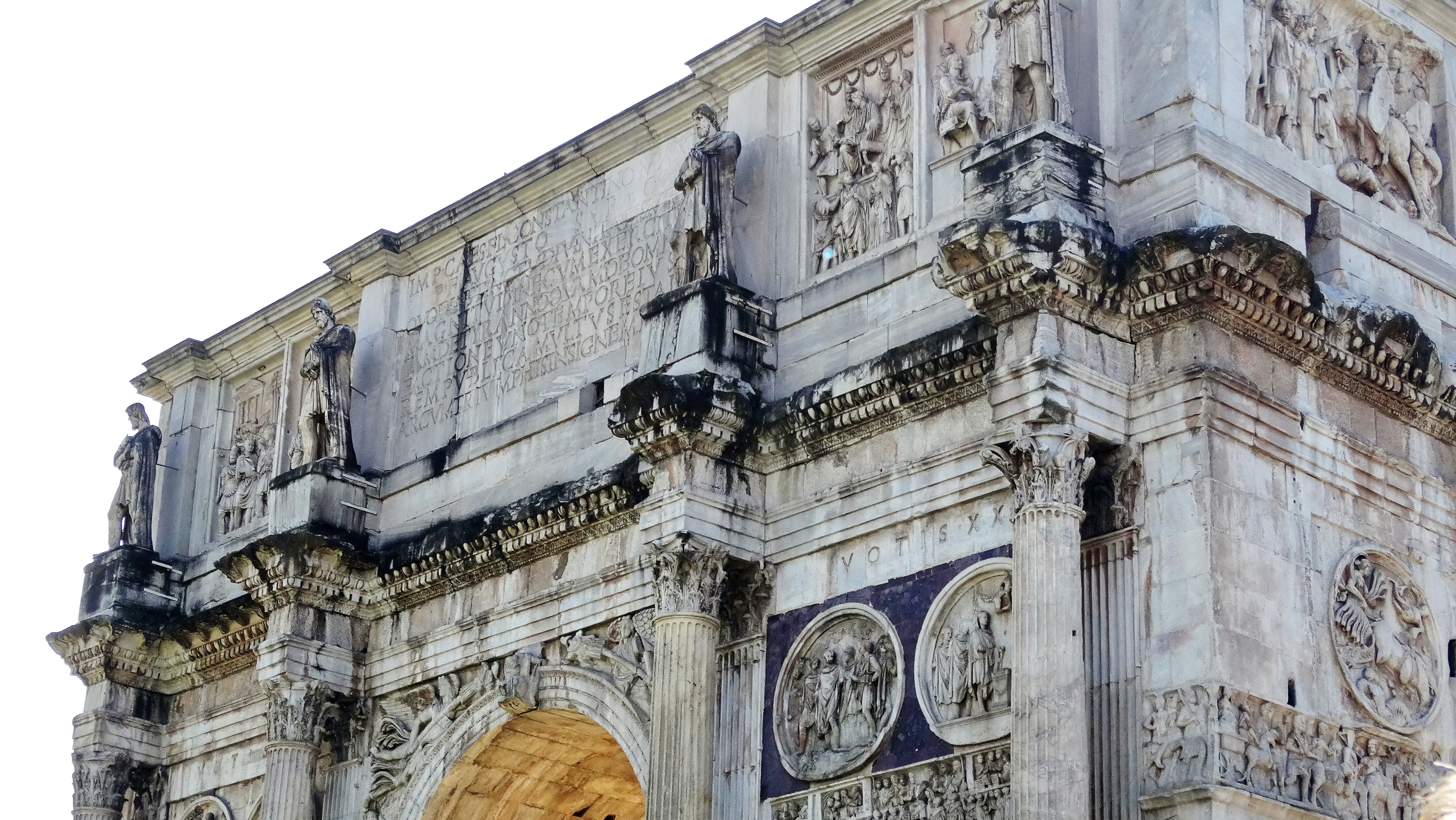 Arco di Costantino, ricostruzione del 315 d.c. su precedente arco dell'epoca di Adriano